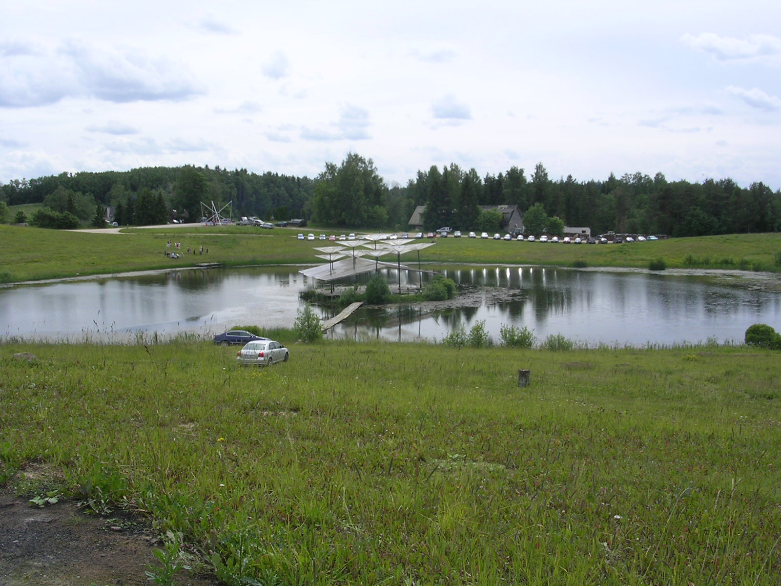 Leigo järv